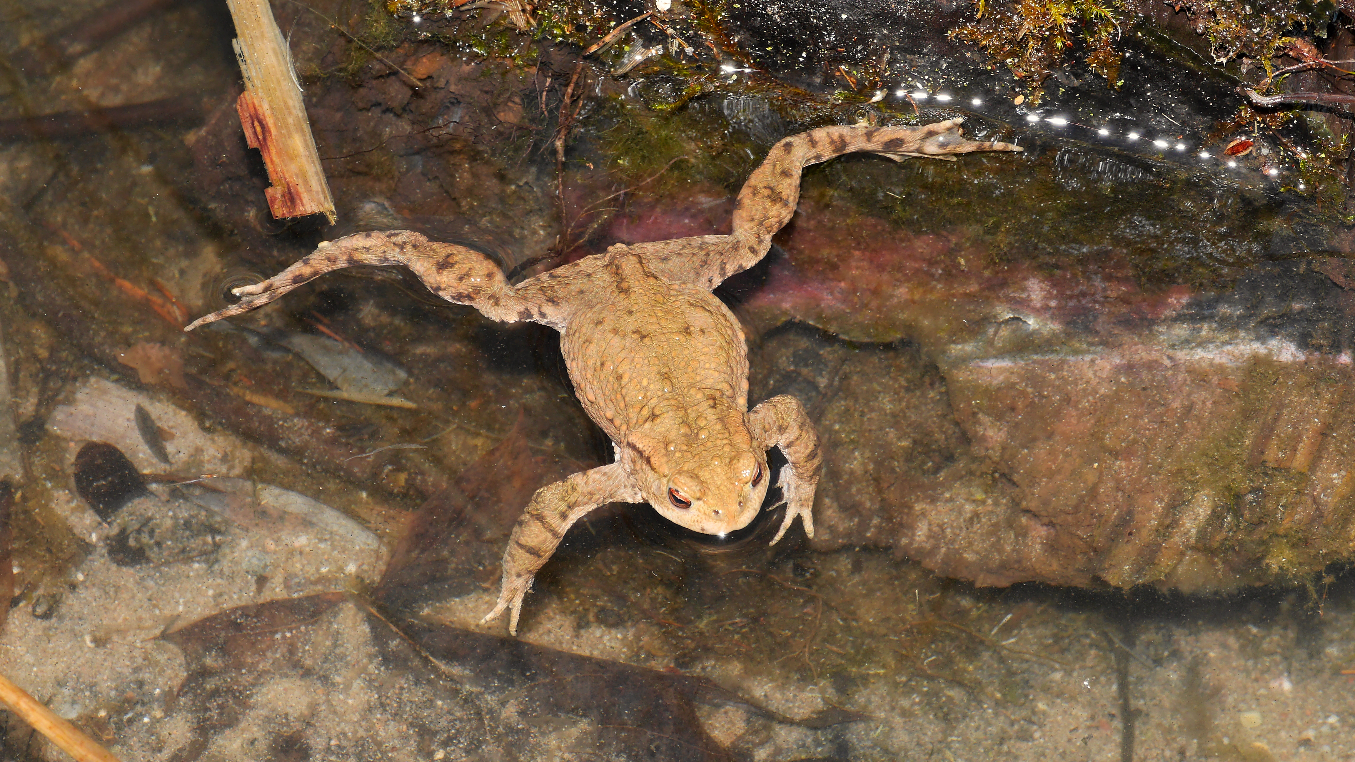 Erdkröte - Bufo bufo, Männchen. Aufgenommen in Mannheim im Käfertaler Wald, Baden-Württemberg, Deutschland.